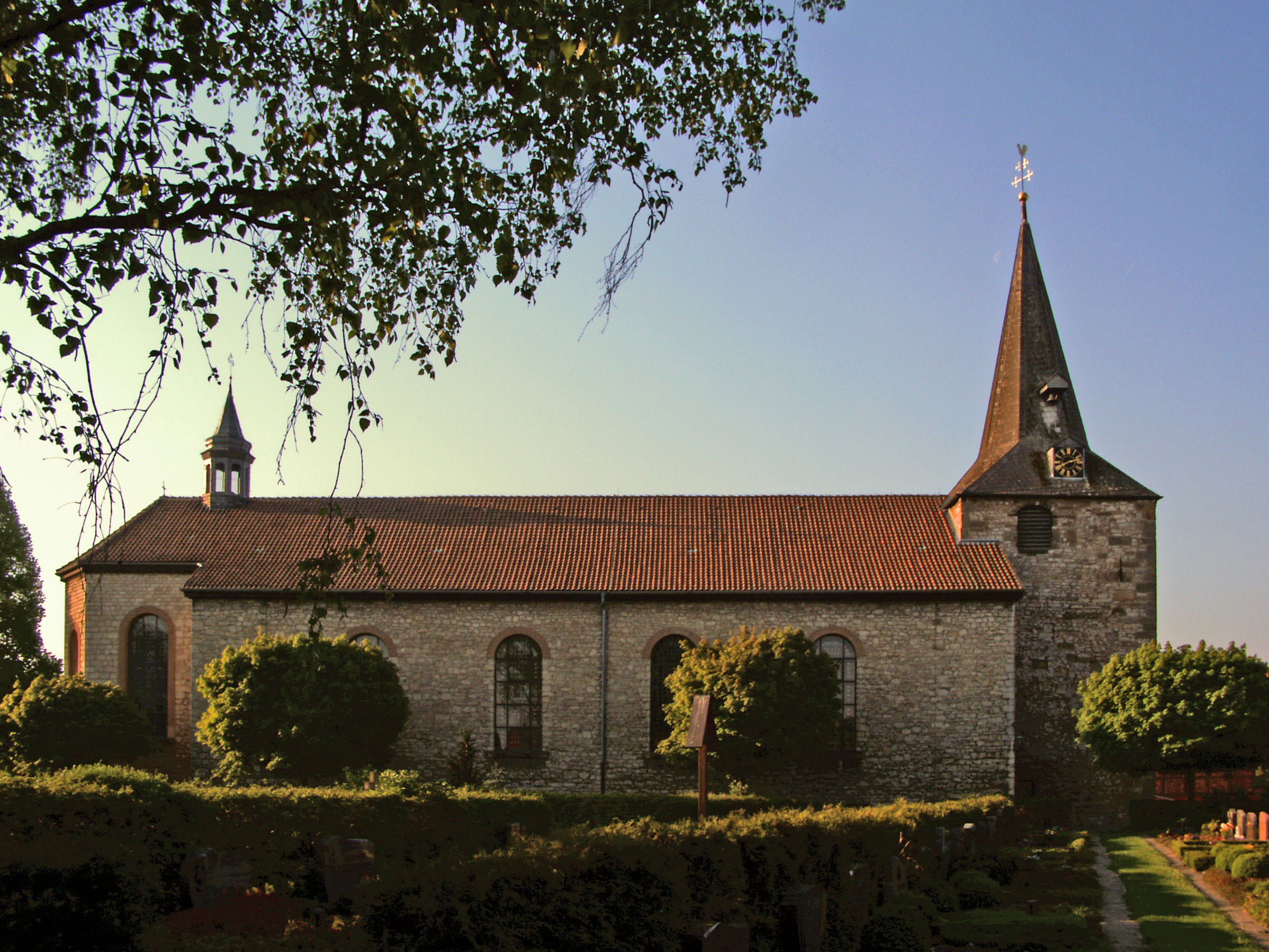 Katholische Kirche St. Martinus in Emmerke, Ortsteil von Giesen, Landkreis Hildesheim, von der Nordseite aus gesehen